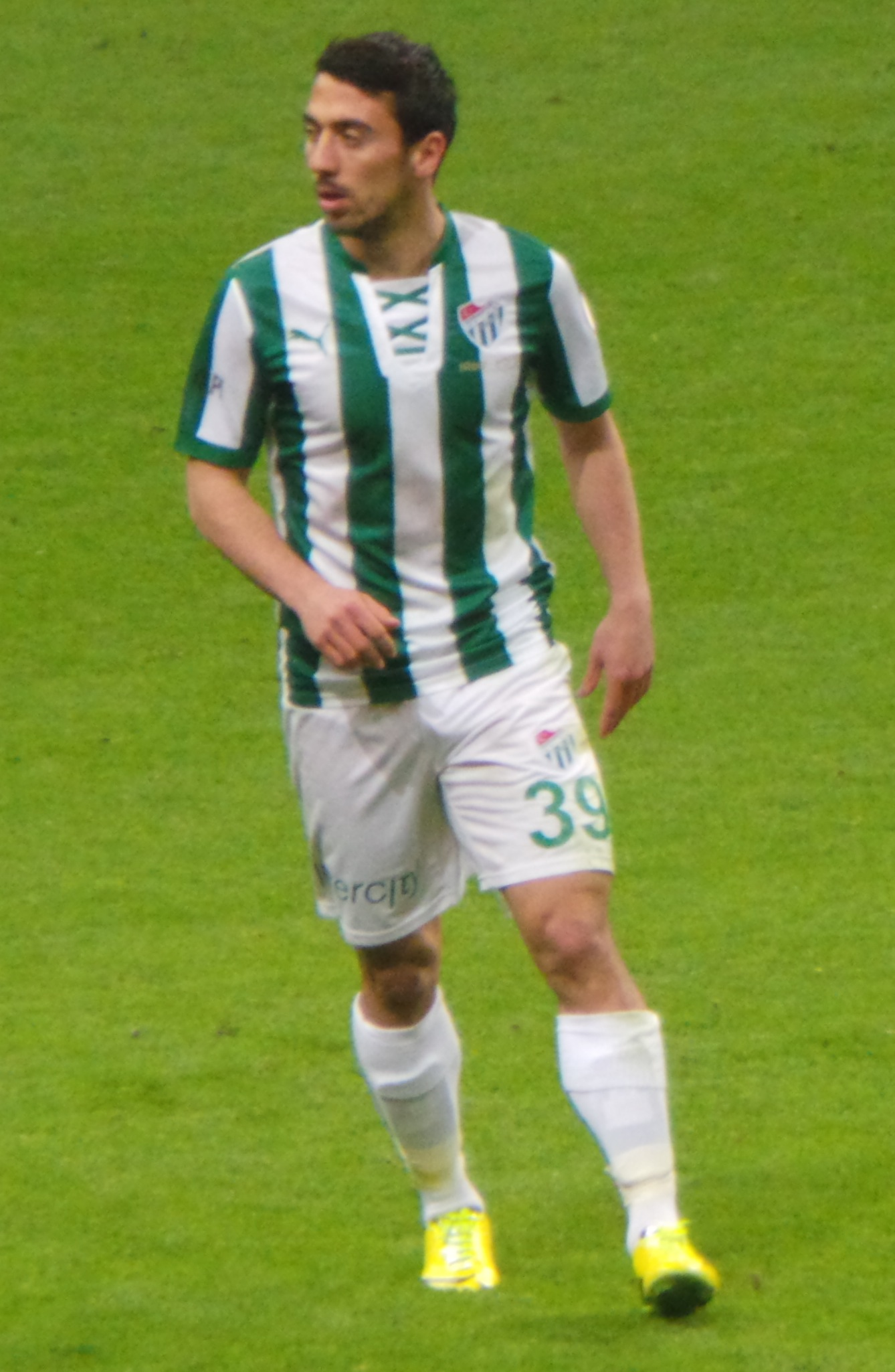 Ferhat Kiraz